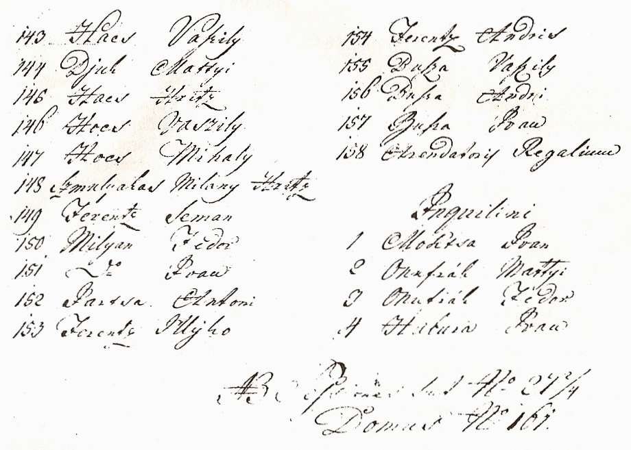 Posledná strana súpisu obyvateľov Habury z roku 1804 opis: Súpis poddaných v Habure zdroj: Habura v rokoch 1818 - 1993